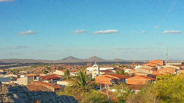 Foto na Serra do Galeão vista para a cidade de Santa Brígida, foto de Marlon Campos